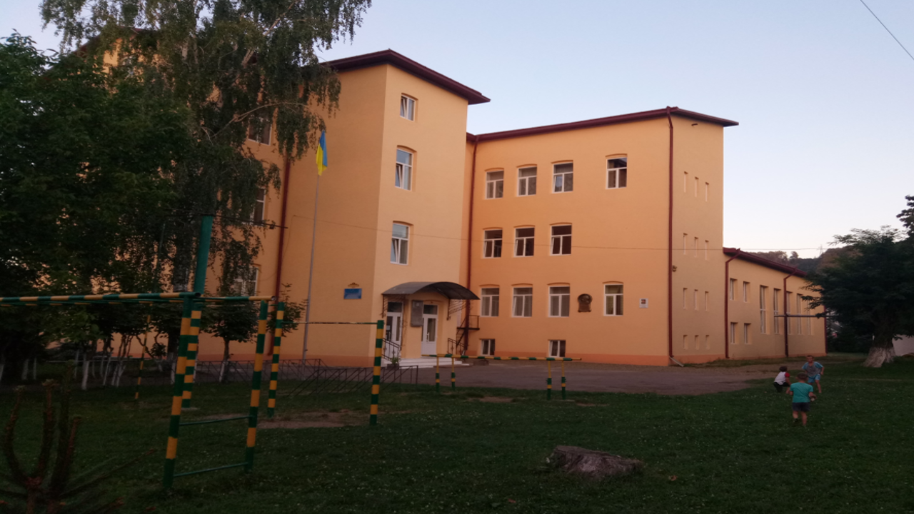 Вижницька гімназія, Чернівецька область